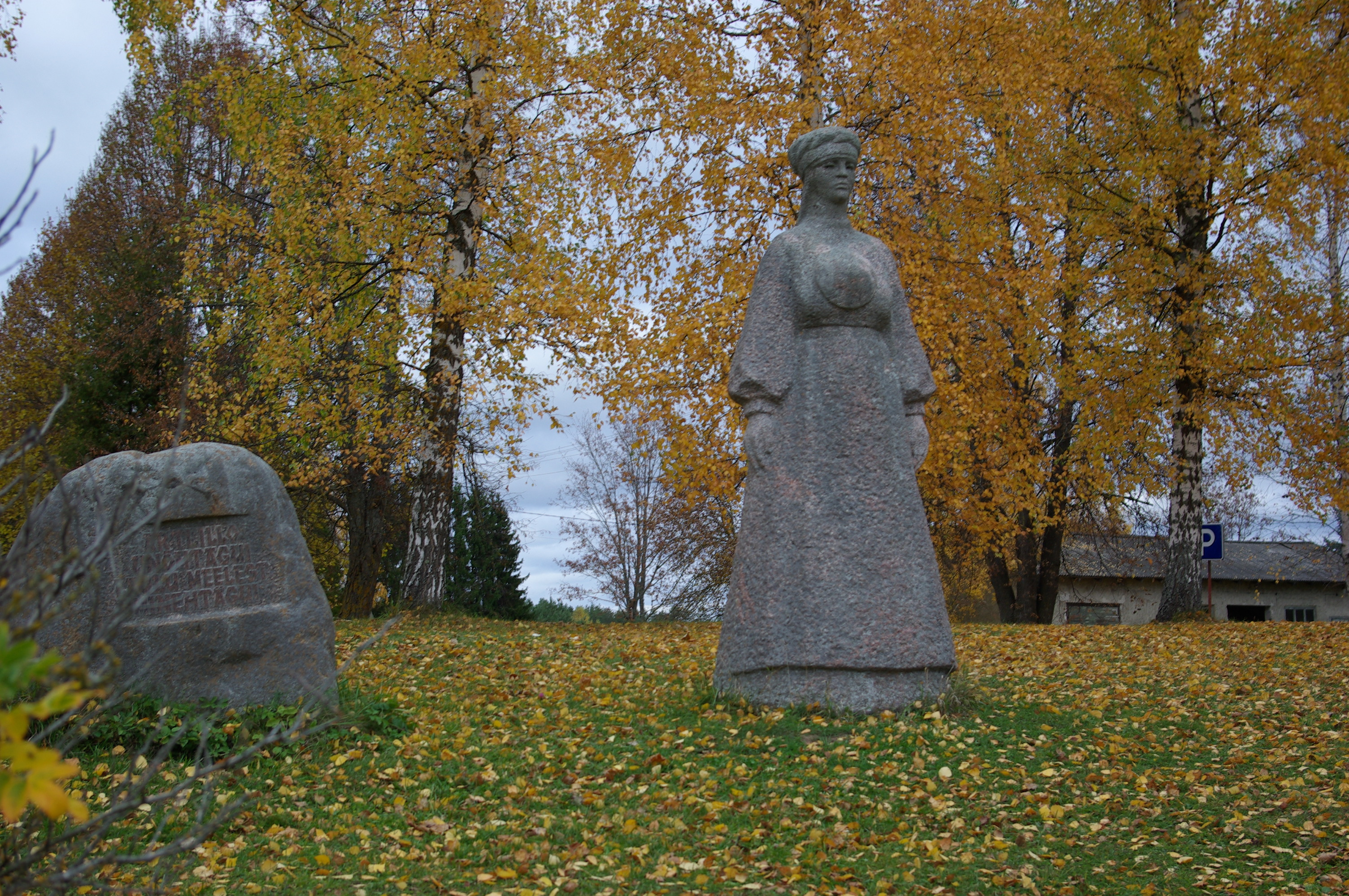 Obinitsa lauluema kuju